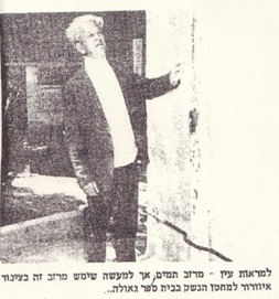 יקותיאל שבח